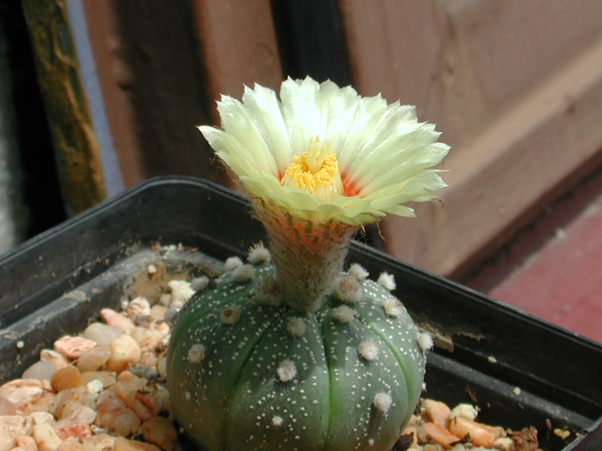 Astrophytum asterias Astrophytum asterias, own work